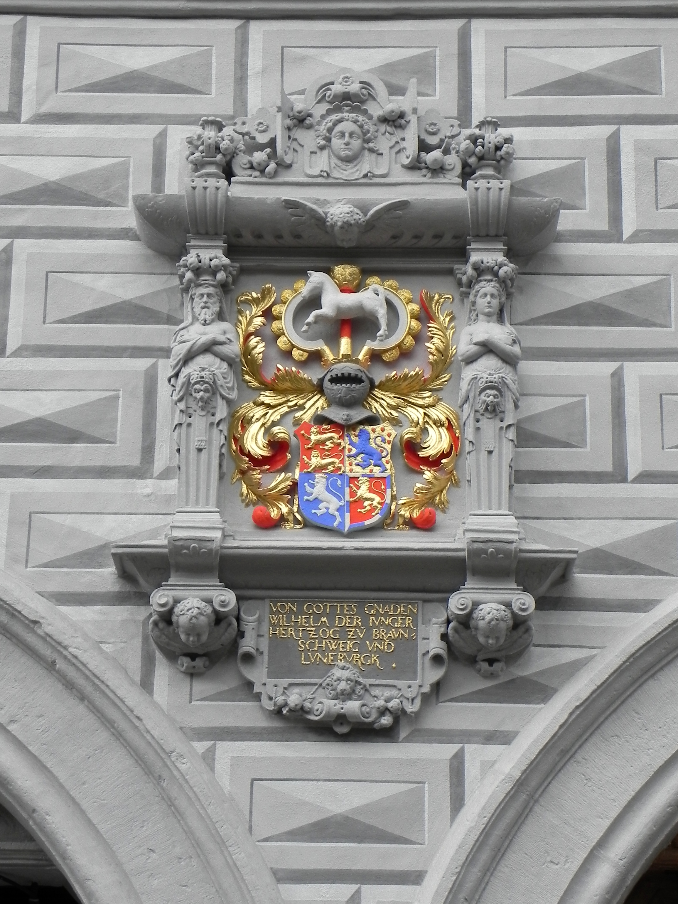 Wappen von Wilhelm dem Jüngeren, Herzog von Braunschweig-Lüneburg (4.7.1535-1592) an der Vorderfront des Alten Rathauses in Celle